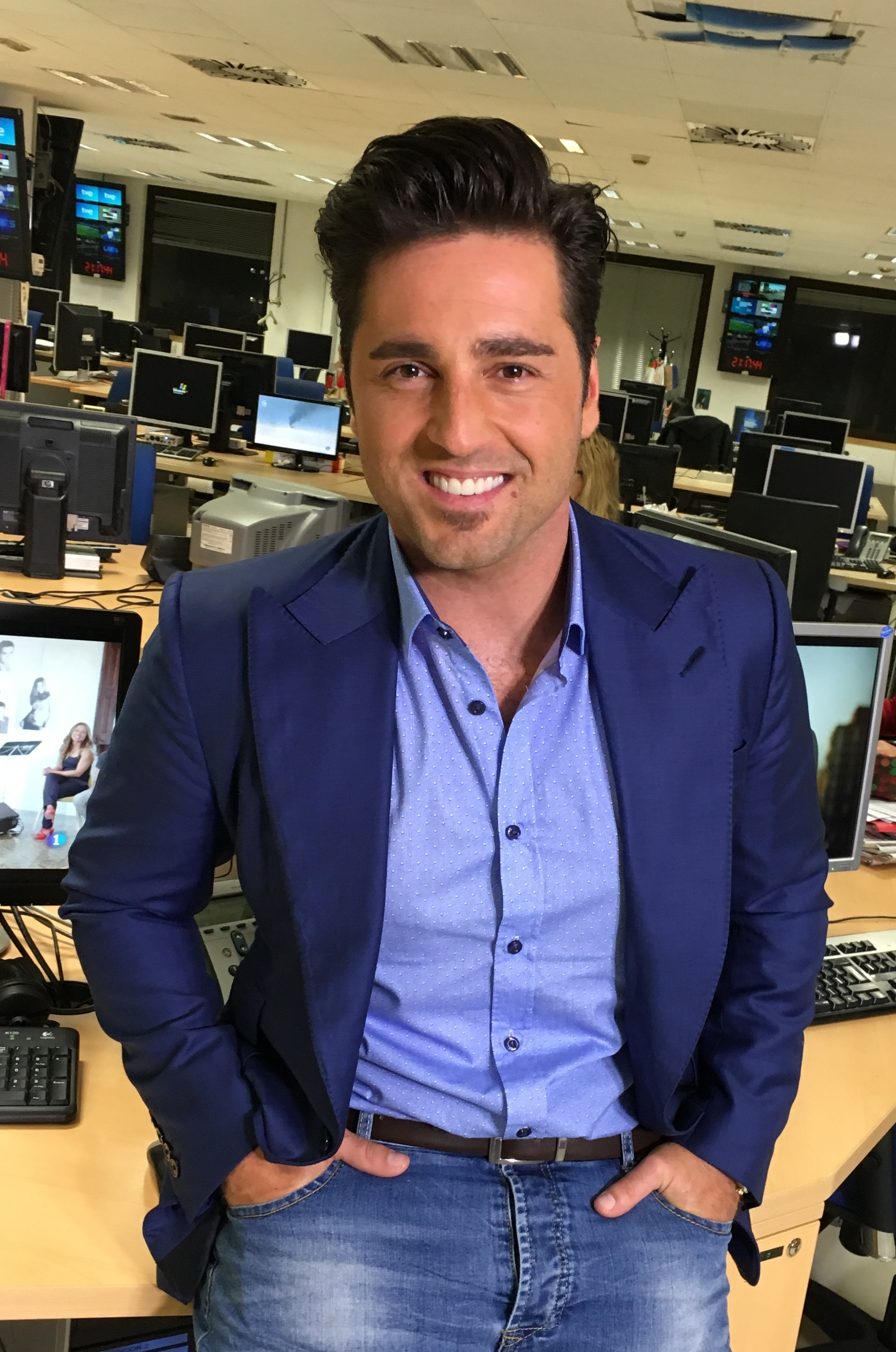 Madrid 2016